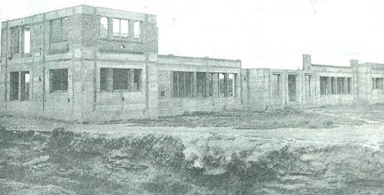 Obras paralizadas de las Escuelas Nacionales en los años 30.